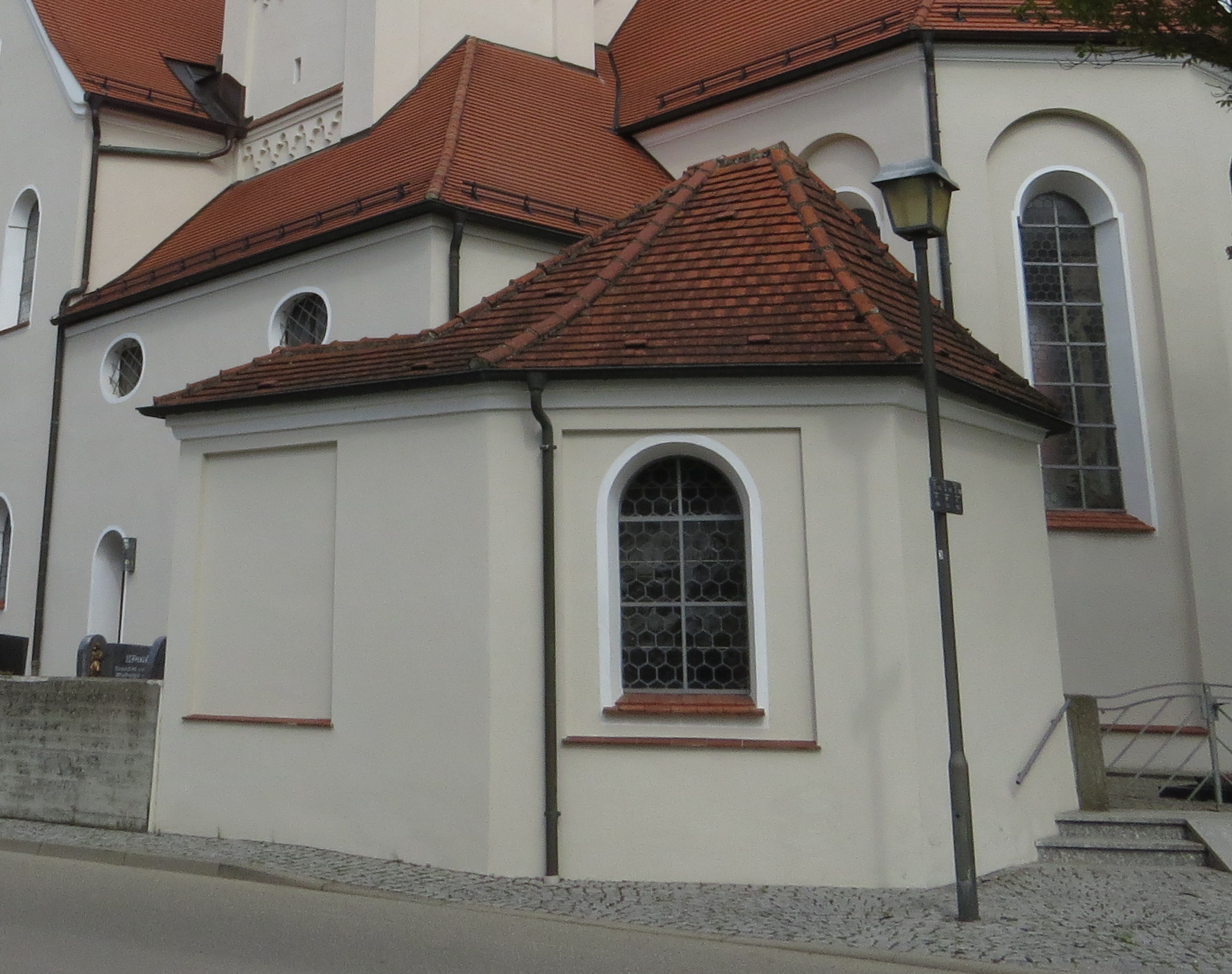 Ehem. Klosterkirche und Friedhofskapelle in Klosterbeuren, Babenhausen (Schwaben)